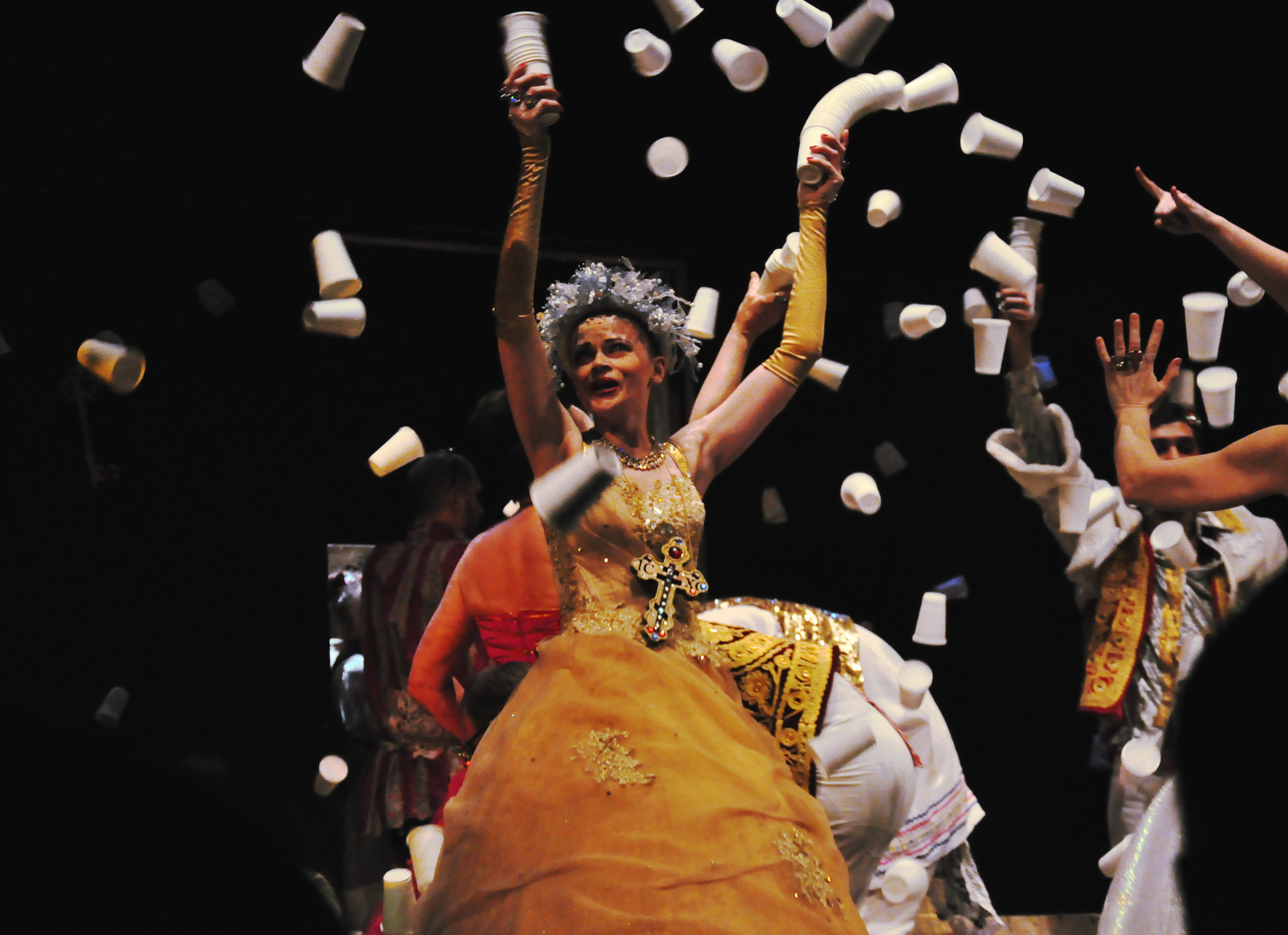 «Вишнёвый сад», постановка Николая Коляды, Москва, 2014